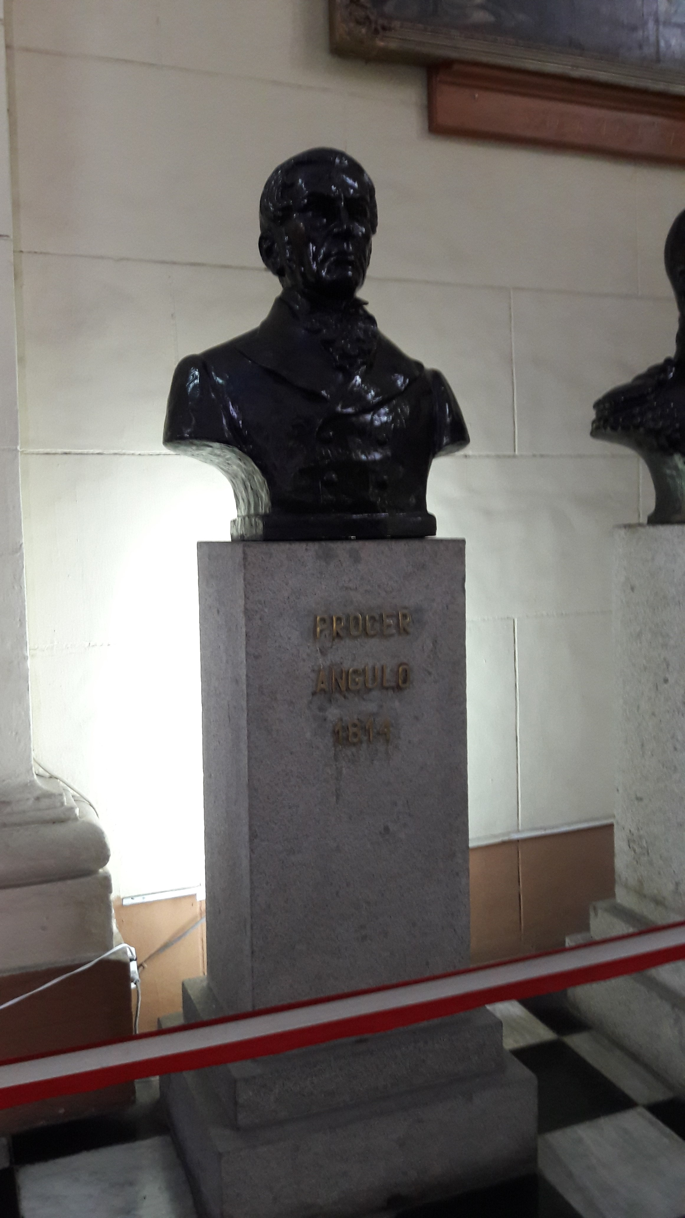 Prócer Angulo 1814